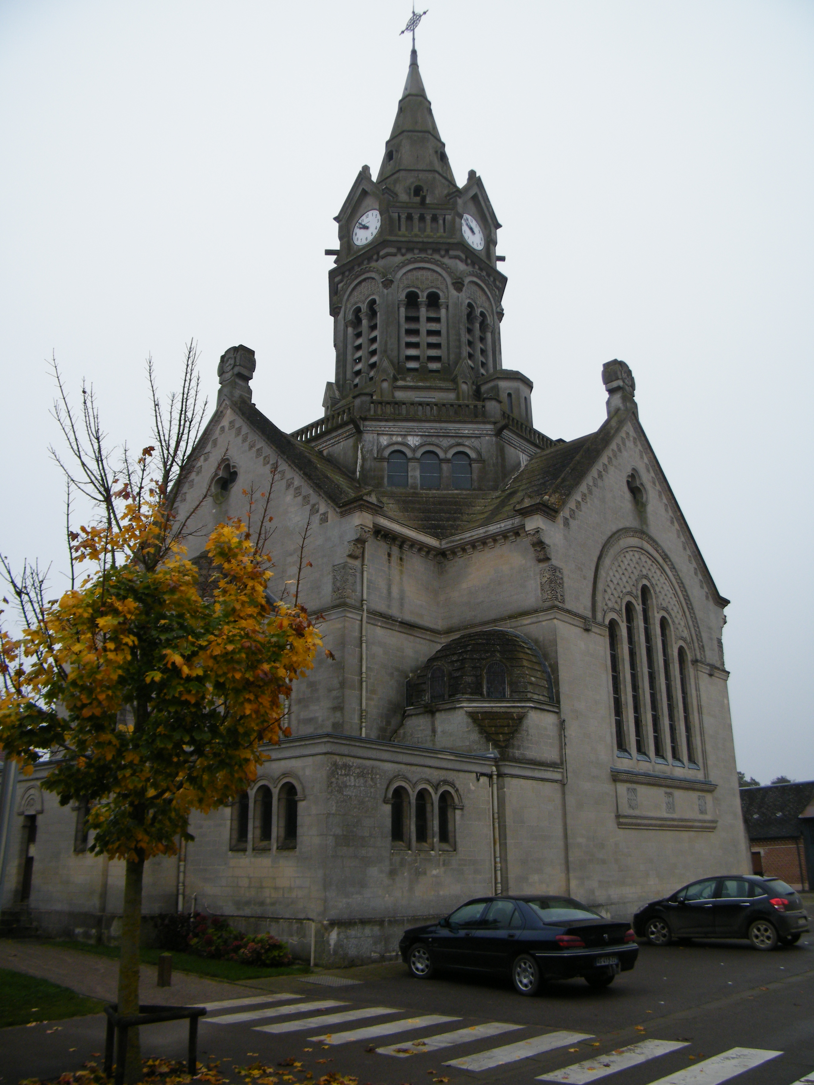 Le style romano-byzantin de l'église.